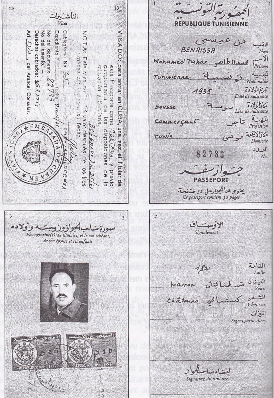 Passport tunisien et visa délivré par l’ambassade de Cuba, a Belgrade (Yougoslavie) au Cdt algérien Mostéfa Merarda sous un faux nom